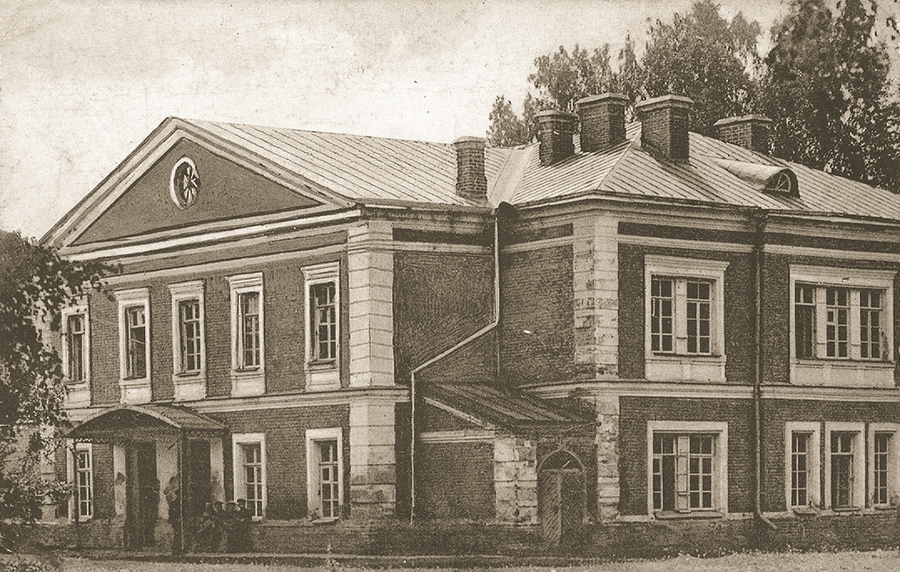 Беларуская (тарашкевіца): Горкі (Horki). Акадэмія. Таксацыя